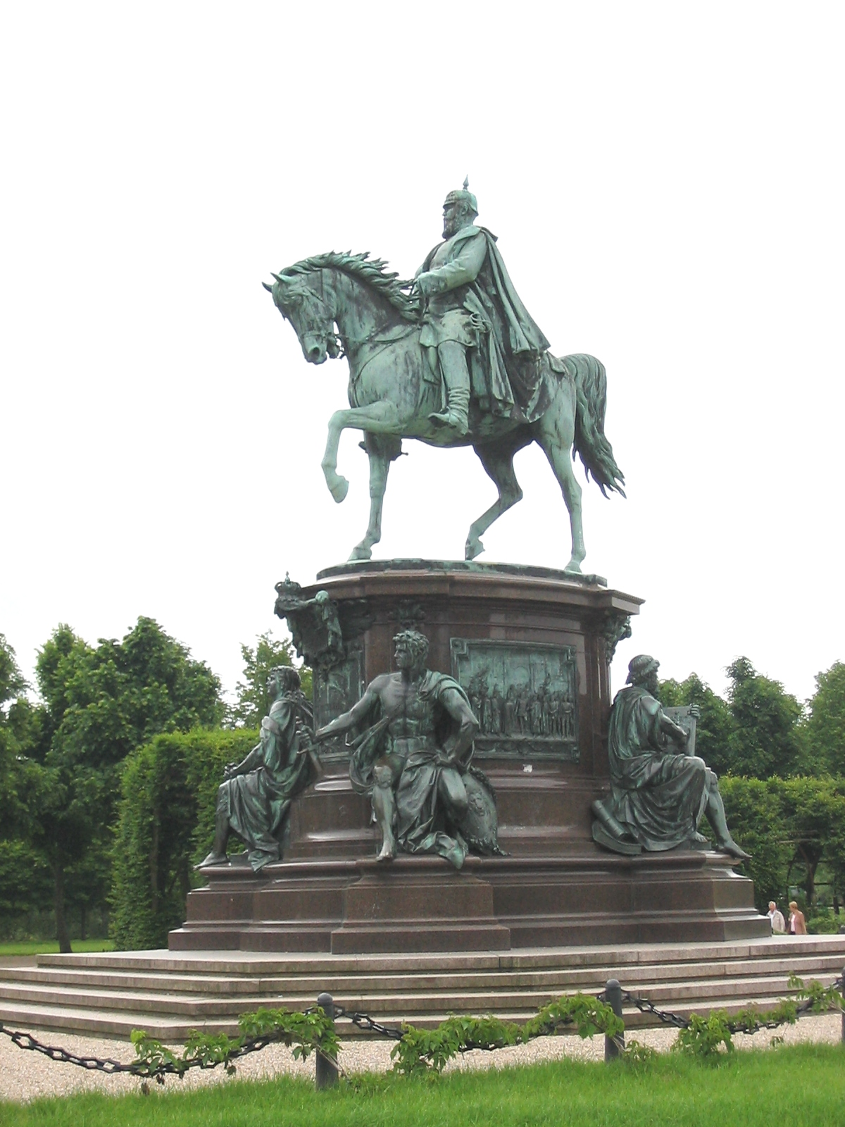 Denkmal/memorial Friedrich Franz II., Schwerin (Germany), Schlossgarten